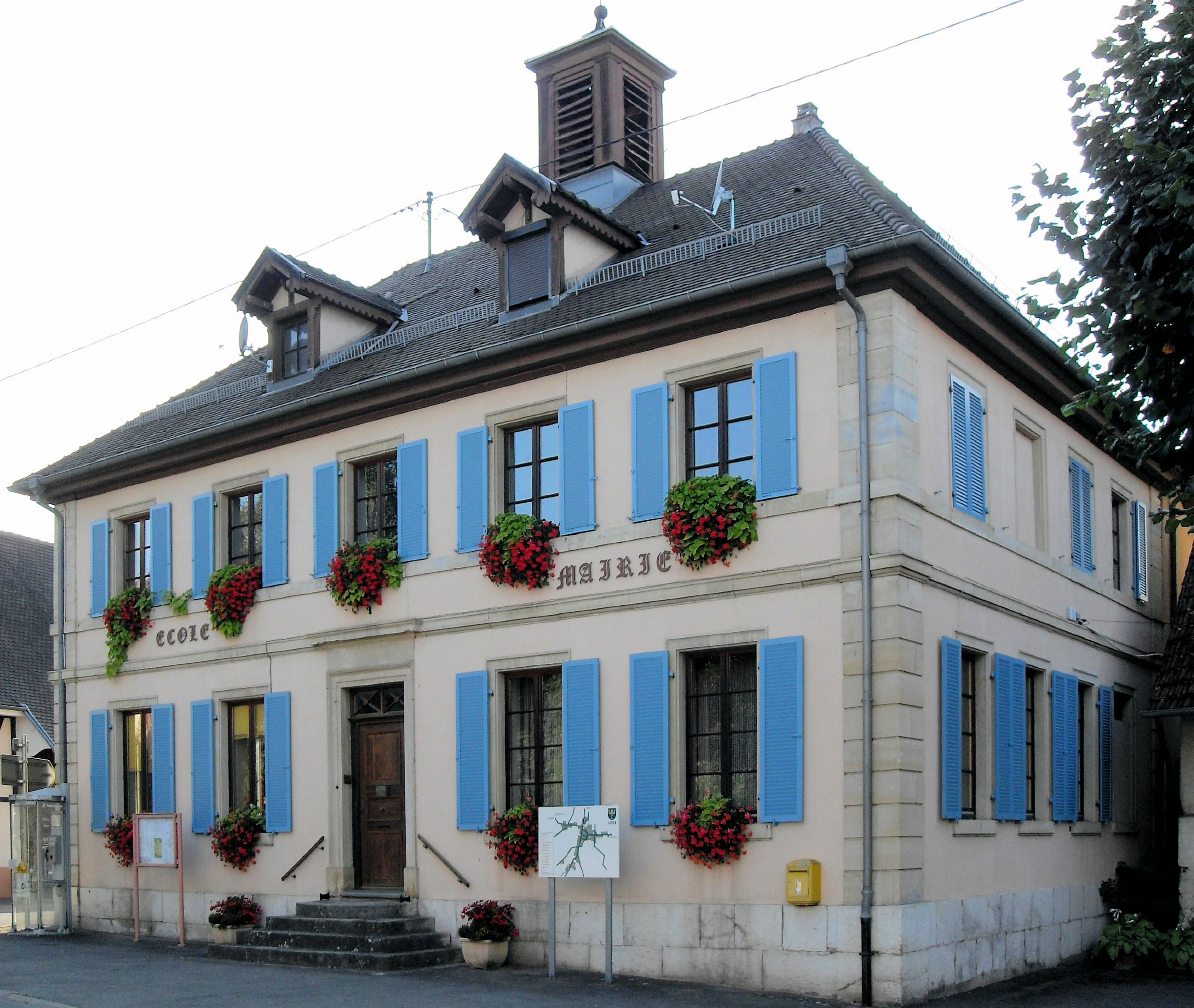 La mairie-école de Lutter